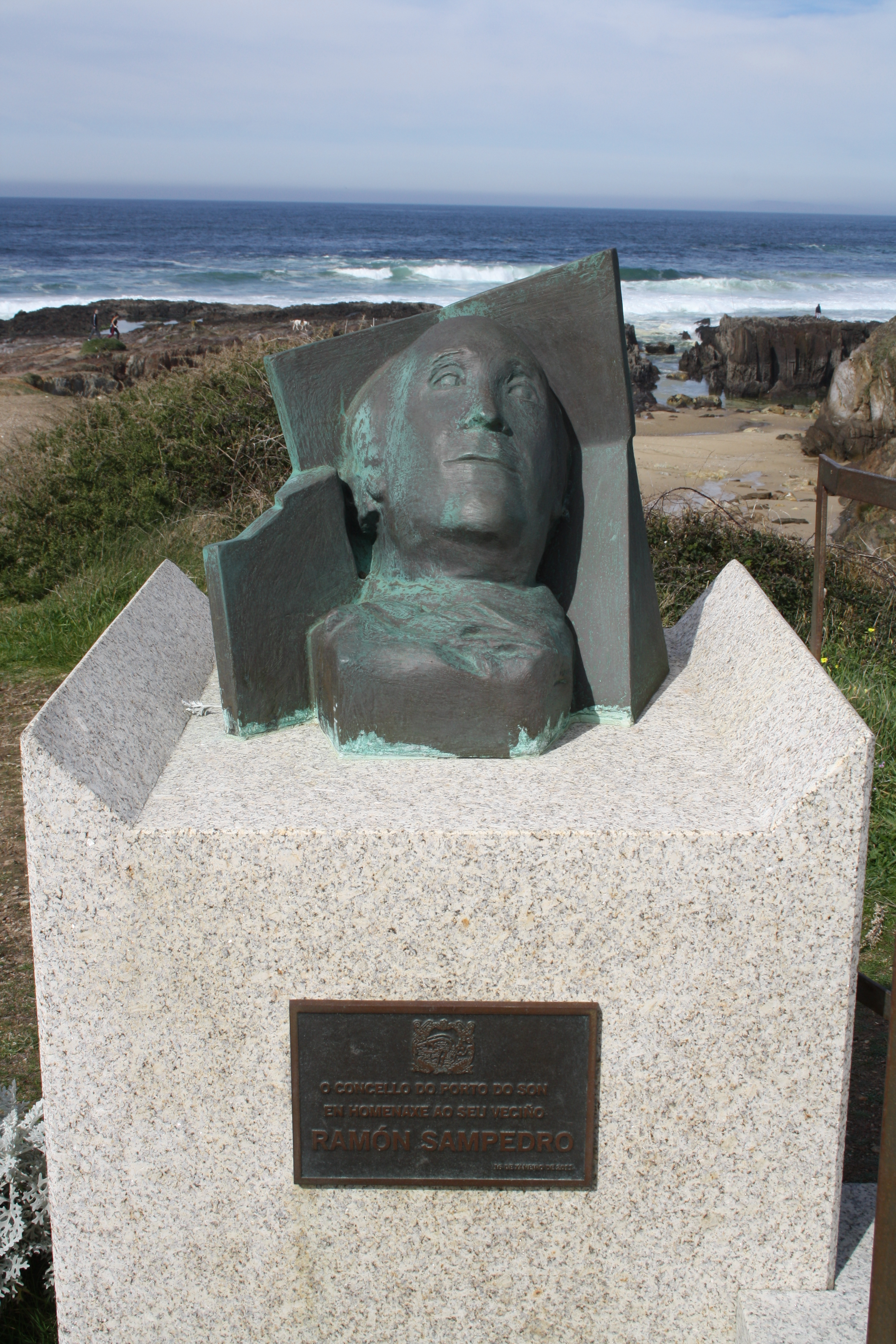 Placa homenaje a Ramón Sampedro en la entrada de la Playa de As Furnas